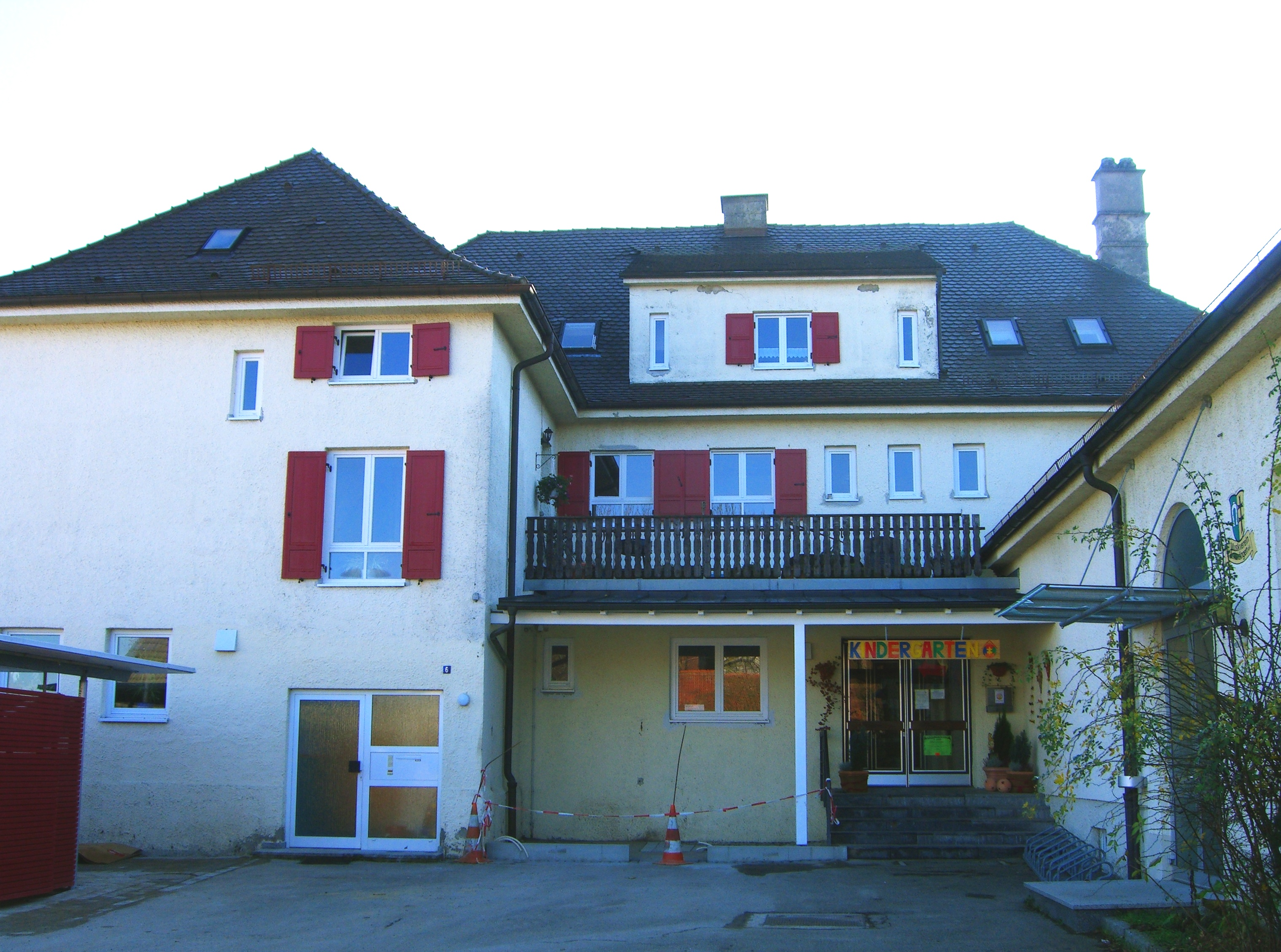 Ehemalige Schule, jetzt Kindergarten in Amendingen